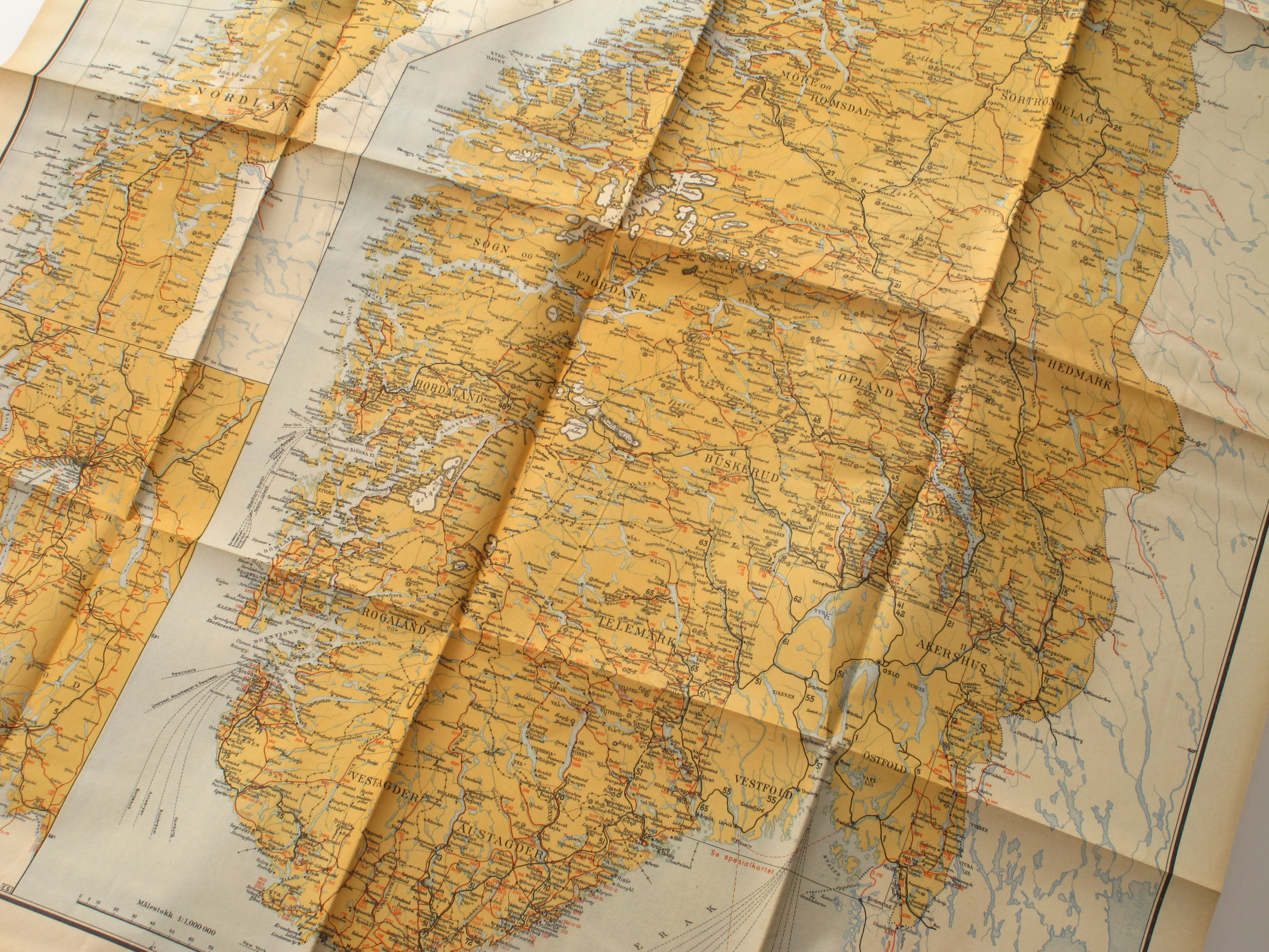 Rutebokens Norgeskart